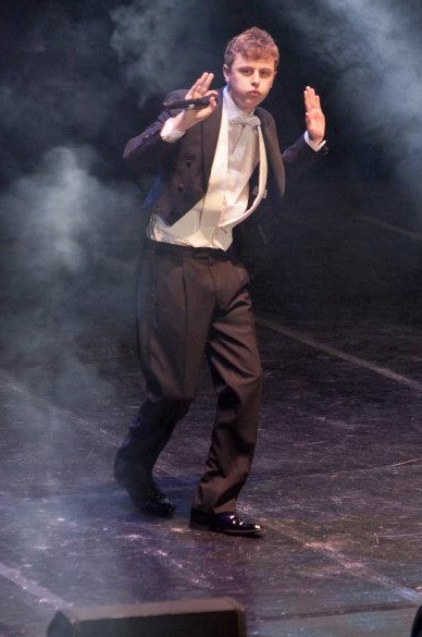 Norman sur scène au Grand Rex à Paris devant 3000 personnes.